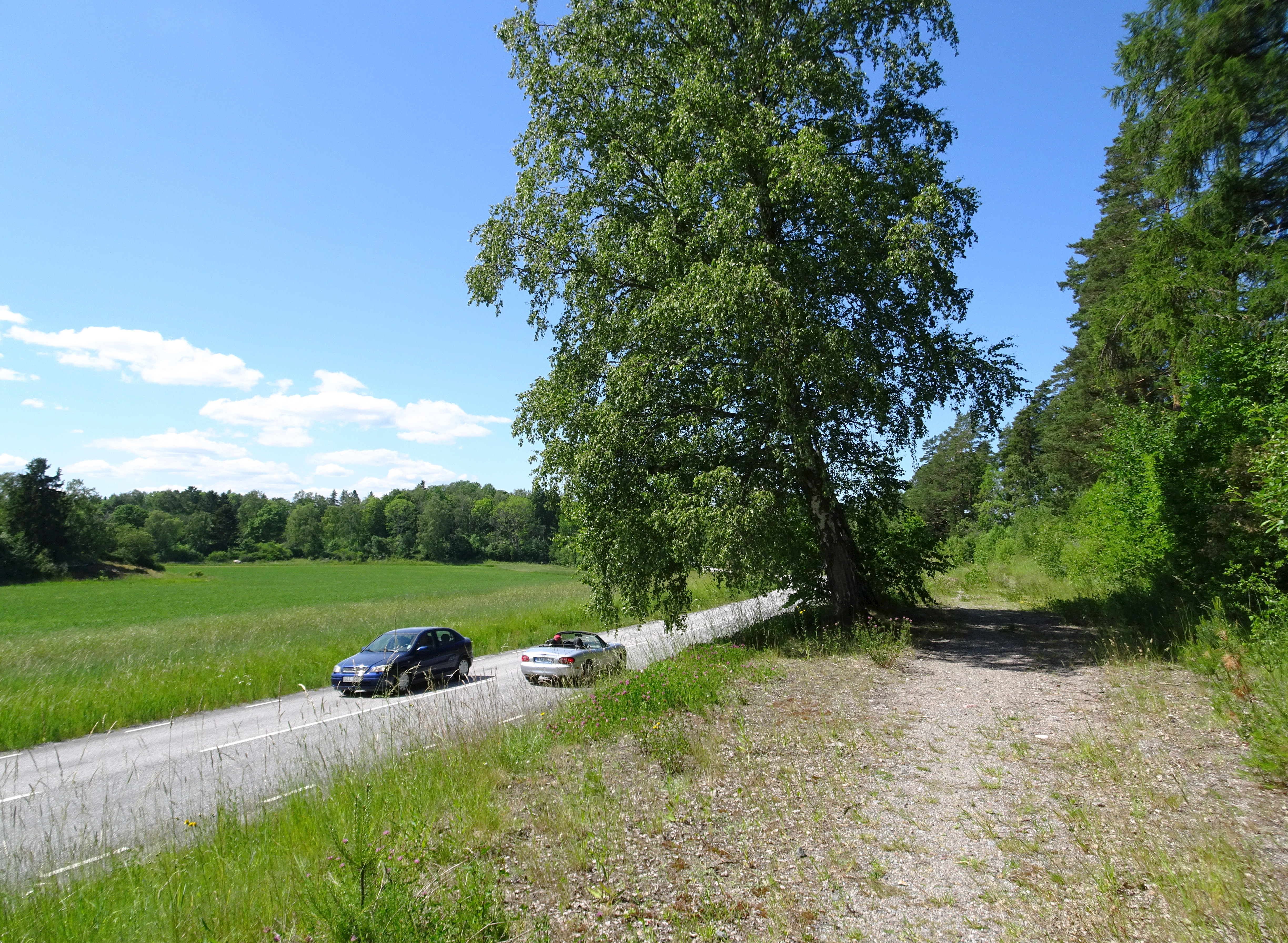 Gamla Södertäljevägen (äldre sträckning - Göta landsväg - till höger) vid Bergaholm (nuv. Bergaholmsvägen)